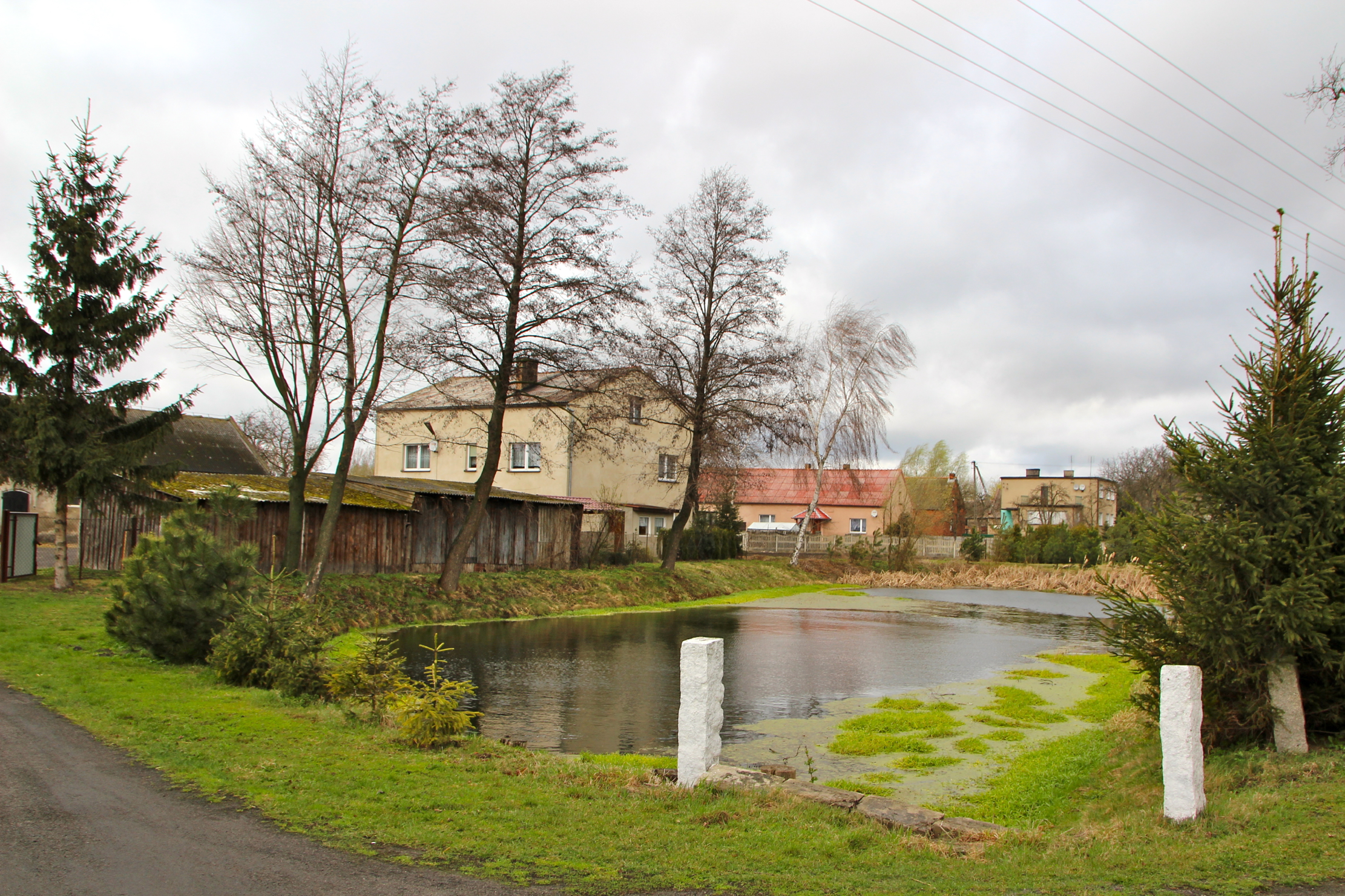 Ogrody – przysiółek w Polsce położony w województwie wielkopolskim, w powiecie leszczyńskim, w gminie Święciechowa. Miejscowość wchodzi w skład sołectwa Lasocice.